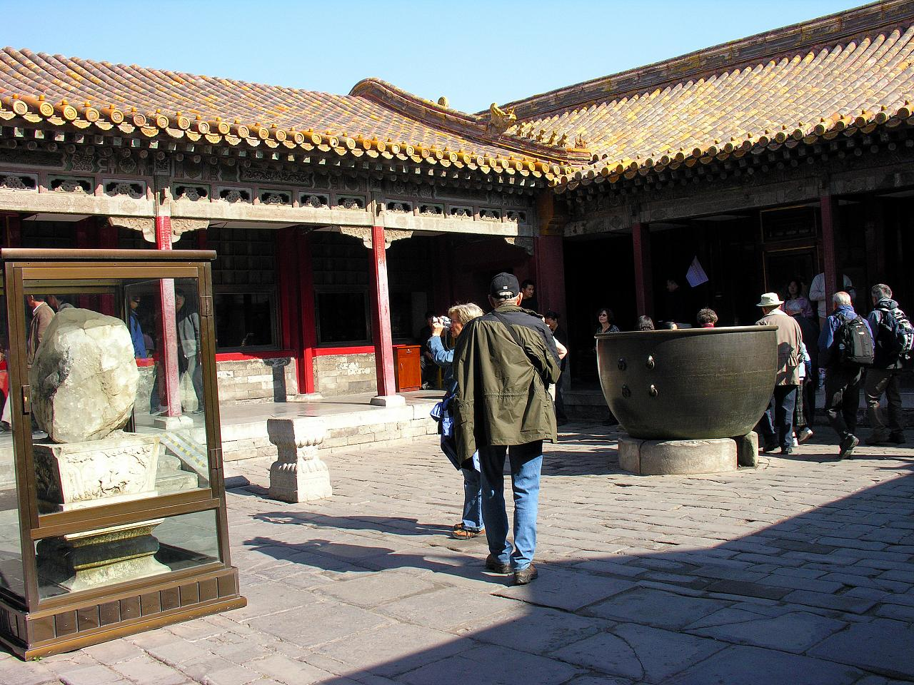 China-6256